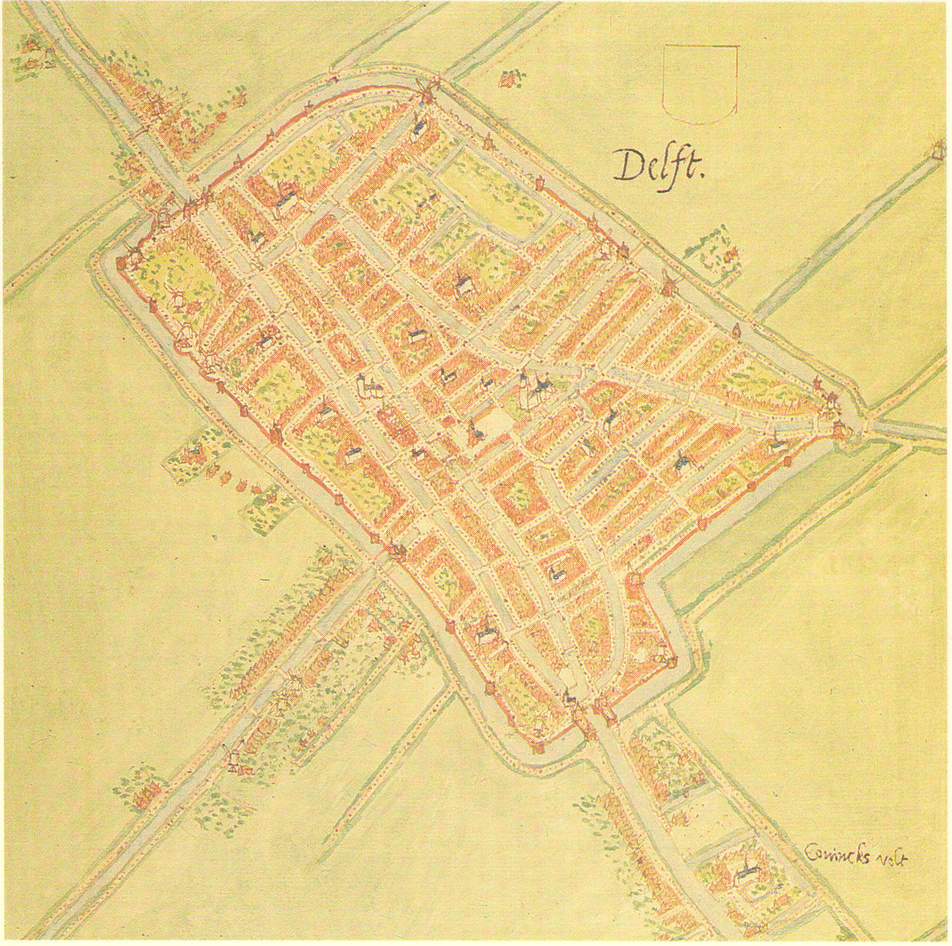 Net tekening van Jacob van Deventer van de stad Delft